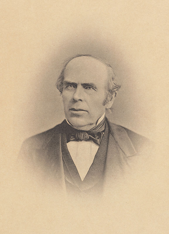 Mark Romer, Baron Romer (1866-1944)